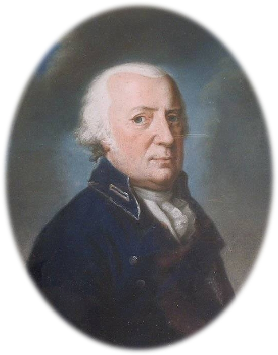 Herzog Karl Wilhelm Ferdinand von Braunschweig (1735-1806). Pastell Brustbildnis in blauem Rock, nach rechts. Vor Wolkenhimmel. Ant.-R. Nach dem um 1795 entstandenen Bildnis Schröders, das in zahlreichen Varianten verbreitet wurde.